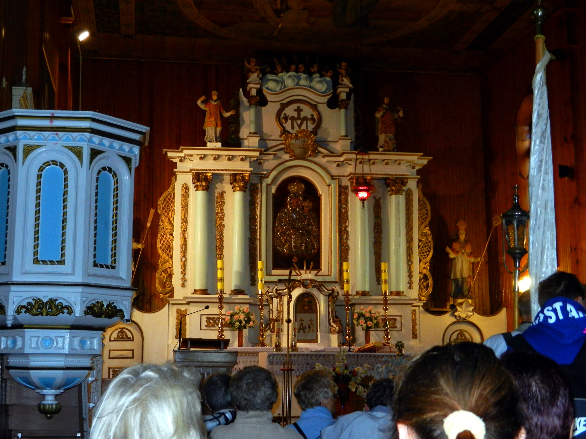 Kościół we wsi Mochowo (powiat sierpecki) - ołtarz.